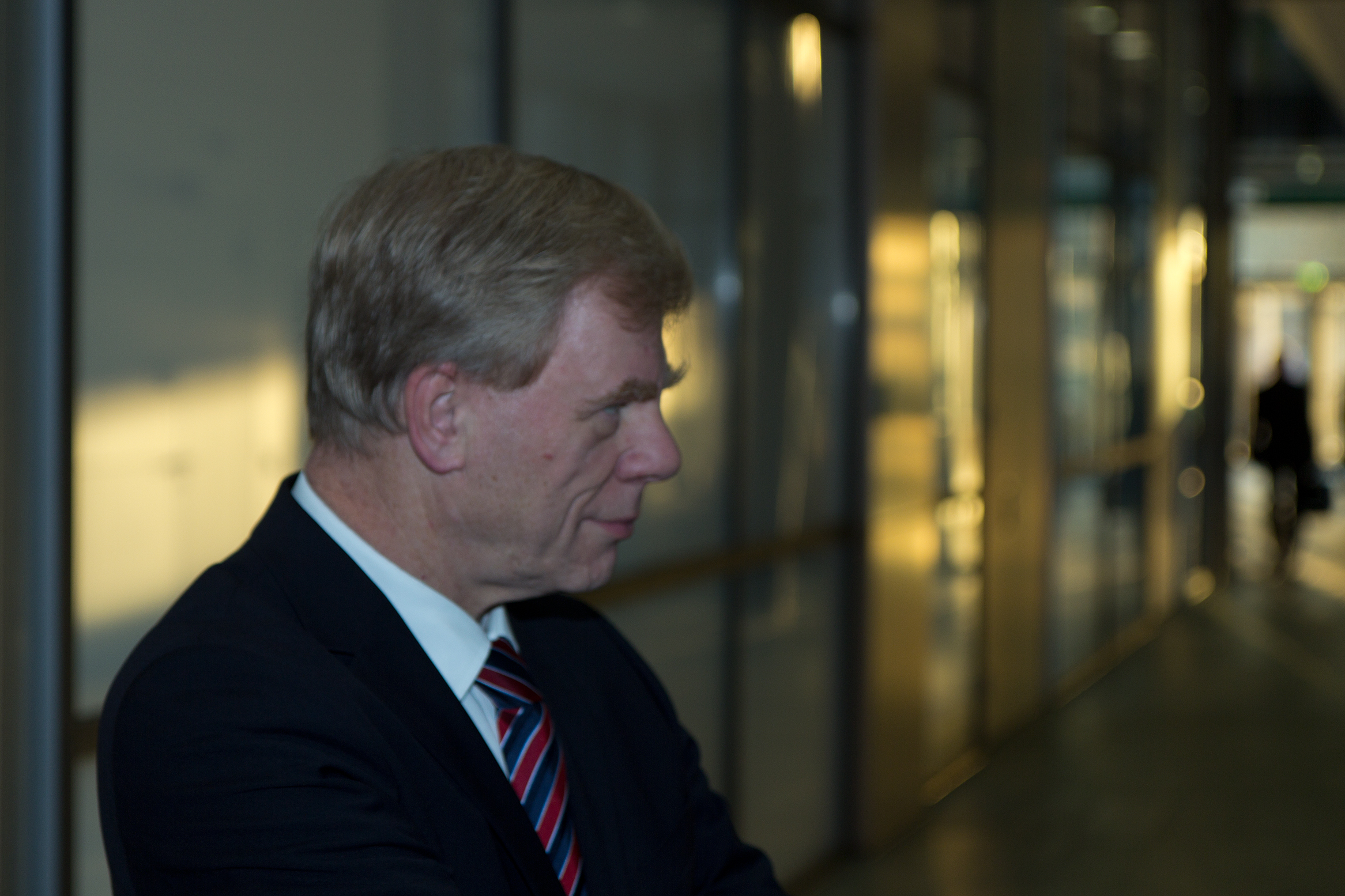 Georg Johannes Unland (* 14. November 1953 in Bocholt) ist ein deutscher Politiker (CDU). Er ist seit 2008 Finanzminister des Freistaats Sachsen. Wikipedia im Landtag – Sachsen 17. bis 18. Dezember 2013 in DresdenDieses Foto wurde im Rahmen des Projektes „Wikipedia im Landtag“ erstellt. Fragen zur Nachnutzung Wenn Sie Fragen zur Nachnutzung dieses Bildes haben, können Sie sich jederzeit gern an wenden